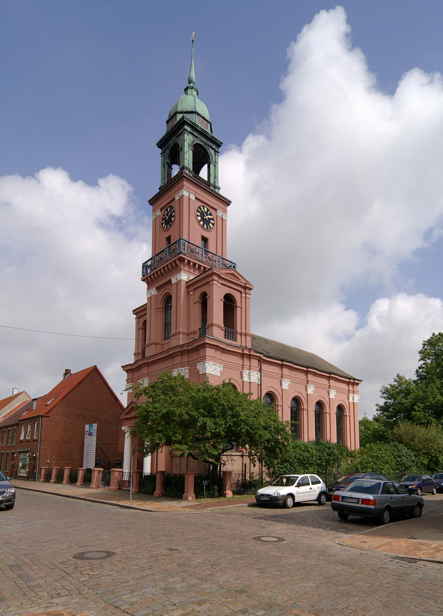 Remonstrantenkirche in Friedrichstadt, Schleswig-Holstein